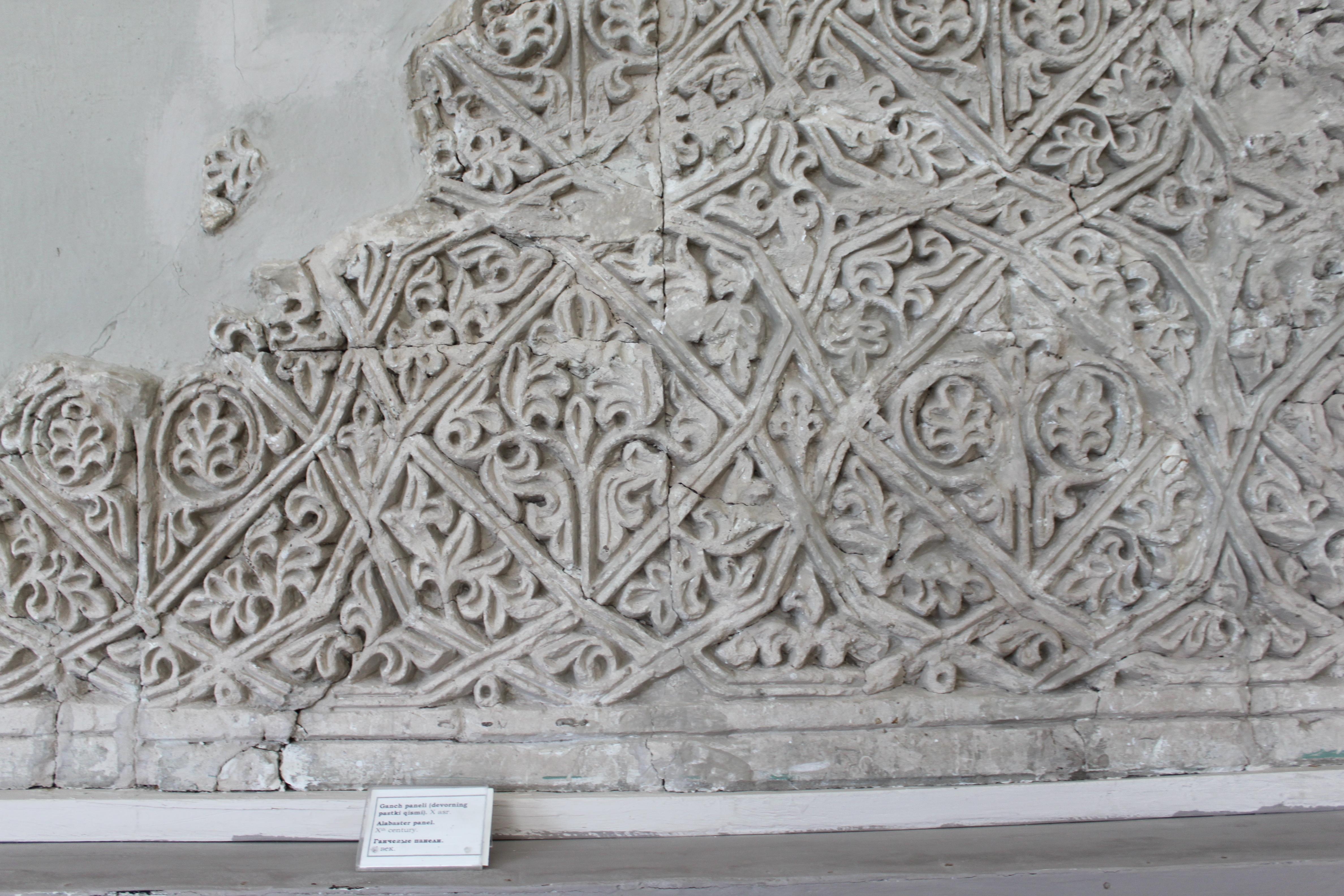 Panneau d'albâtre période islamique (X ième siècle)